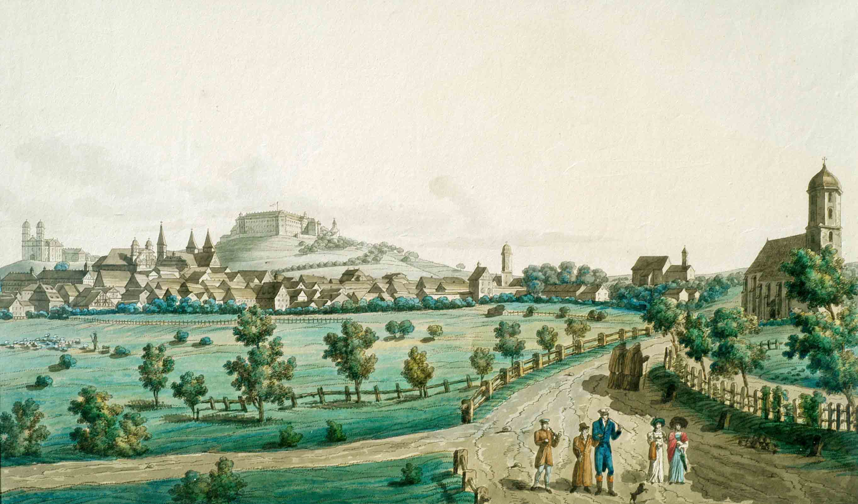 Ansicht von Ellwangen an der Jagst